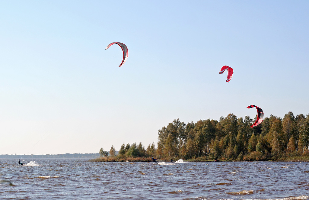 Rėkyvos ežeras, Šiauliai